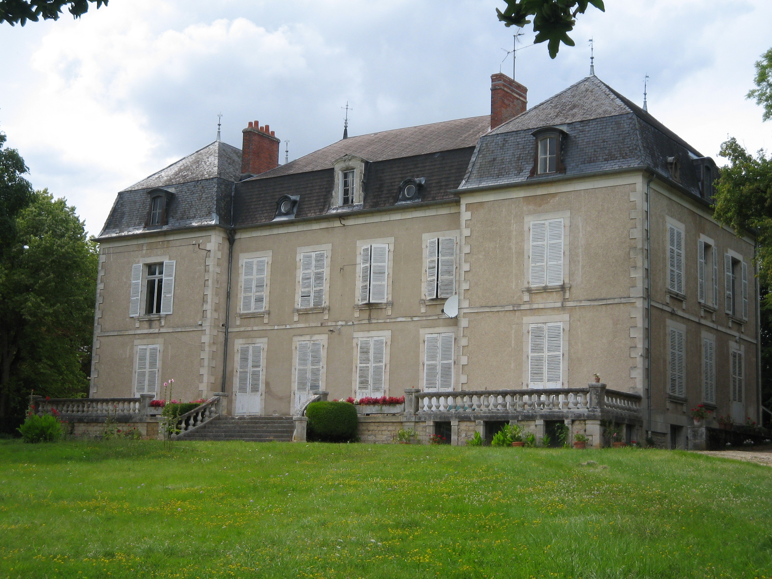 Château de Maurepas, fin XIXème -Chéry